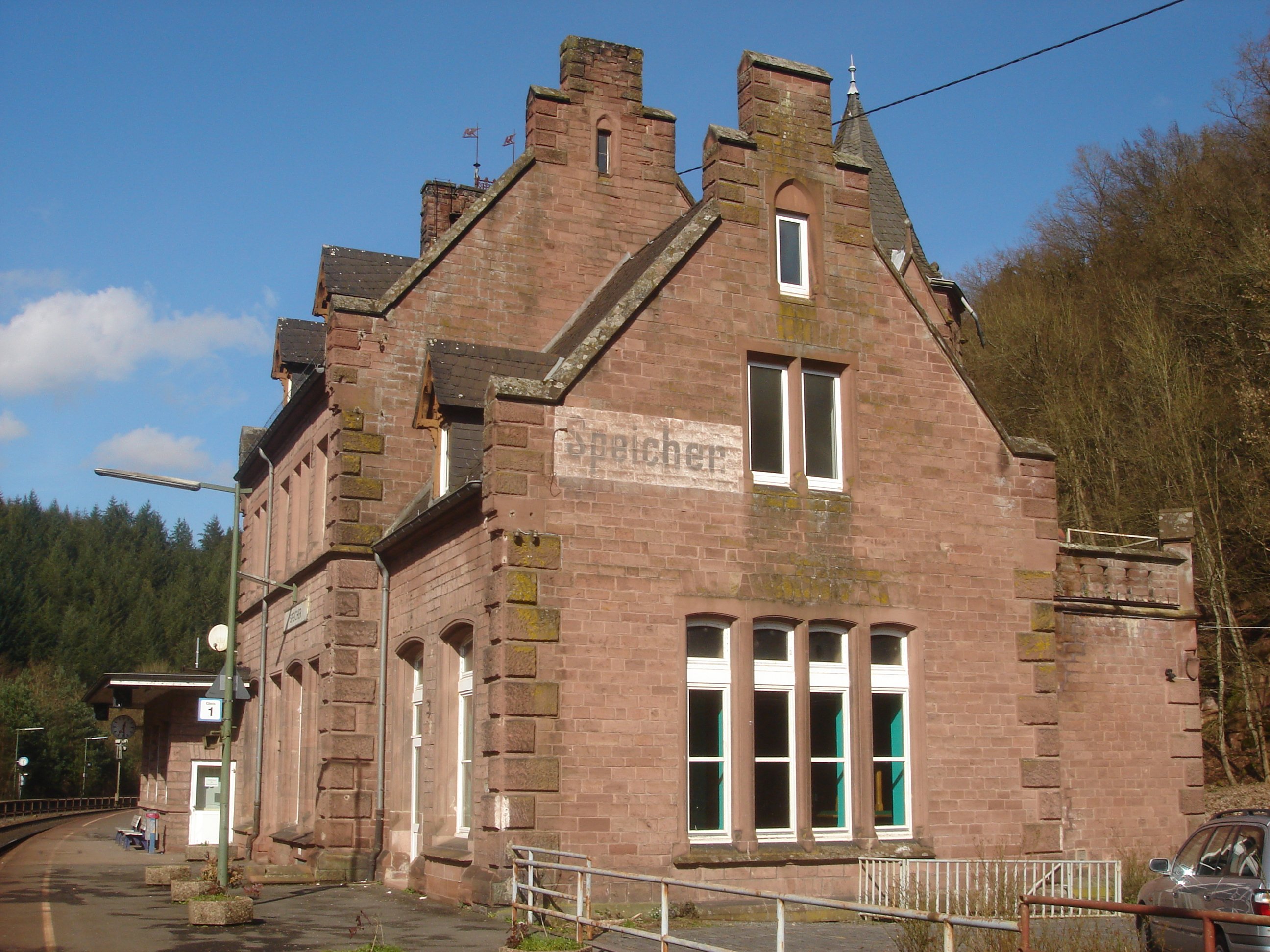 Speicher Train Station, Germany